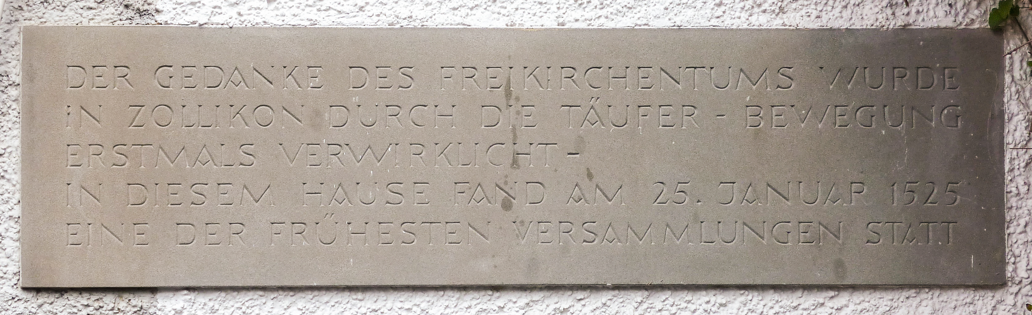 Erinnerungstafel an die Wiedertäufer an der Gstadstrasse 23 in Zollikon